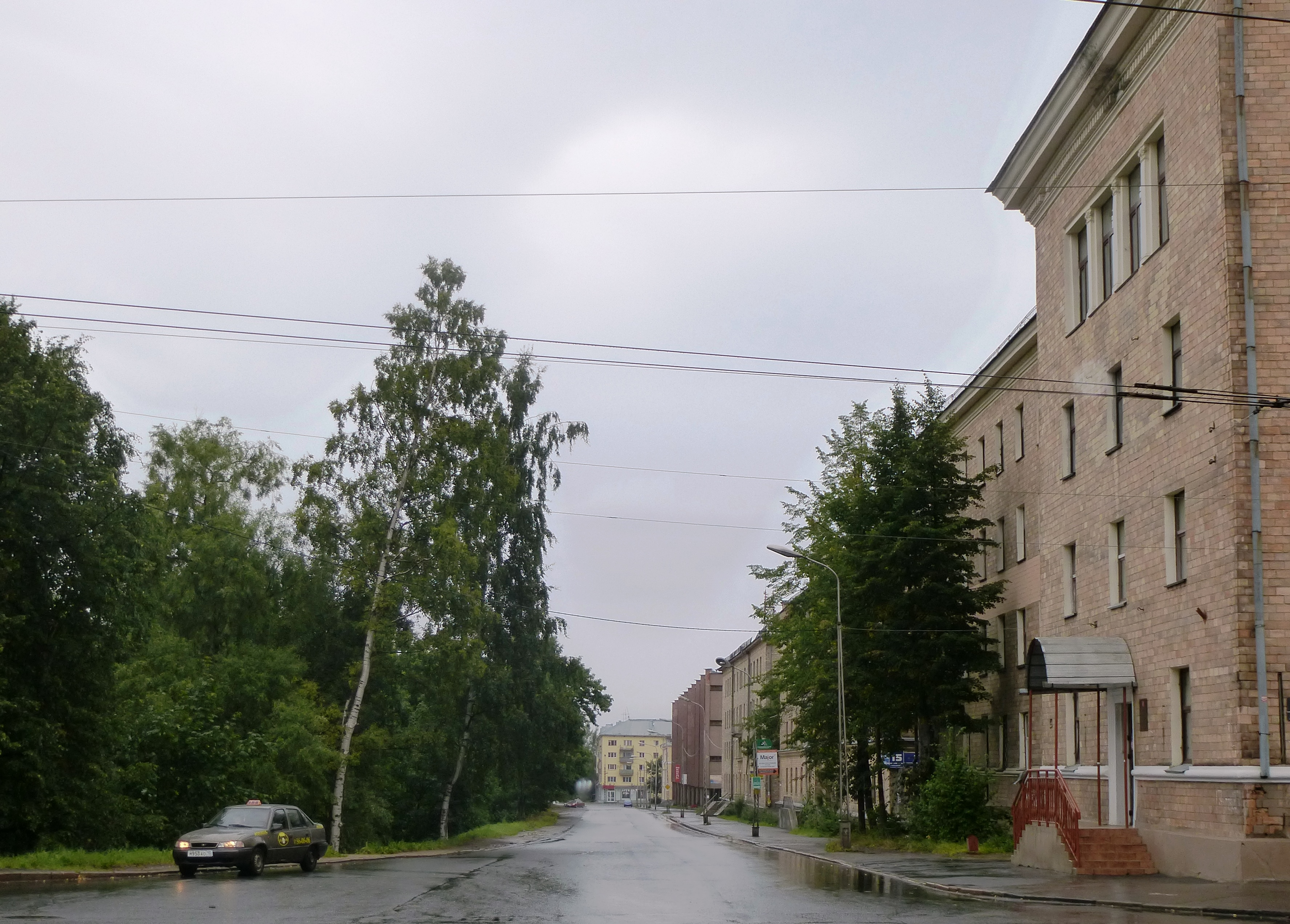 Здания на набережной Э.Гюллинга в Петрозаводске